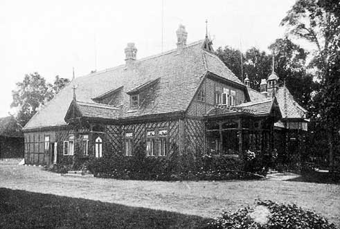 ehemaliges Wohnhaus von Richard Toepffer in Lopau. Es wurde 1978 abgerissen